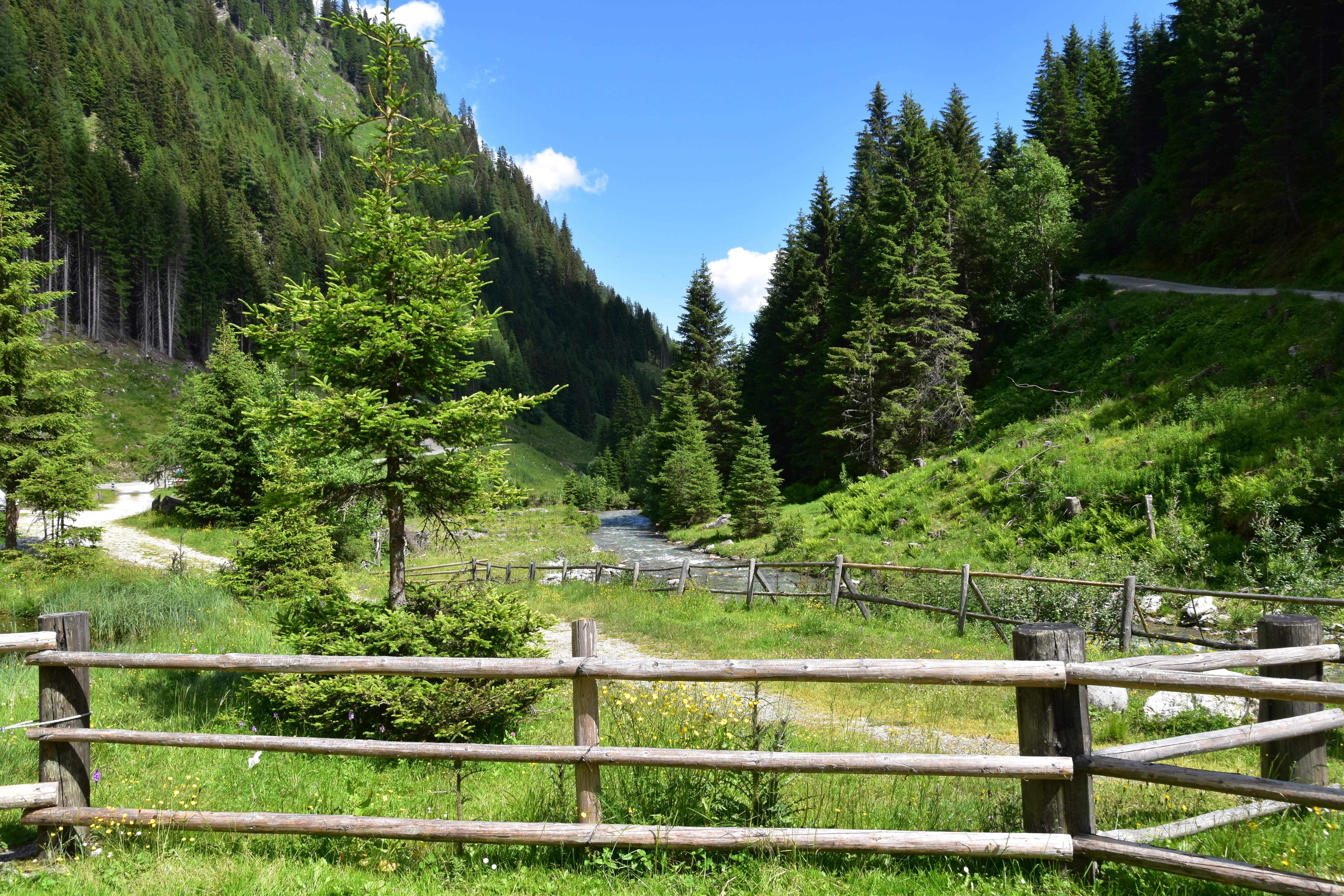 Hintermur, Parkplatz Muritzen